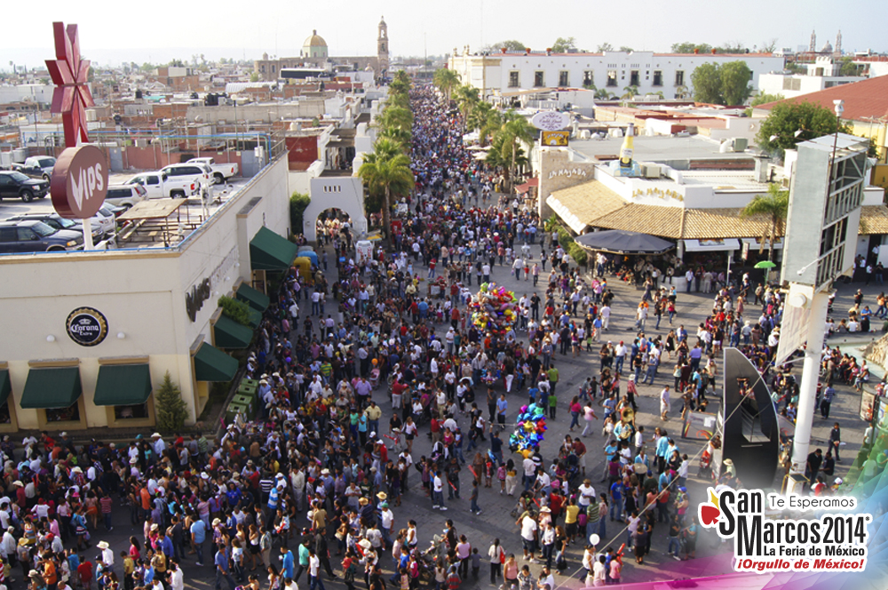 Feria Nacional de San Marcos